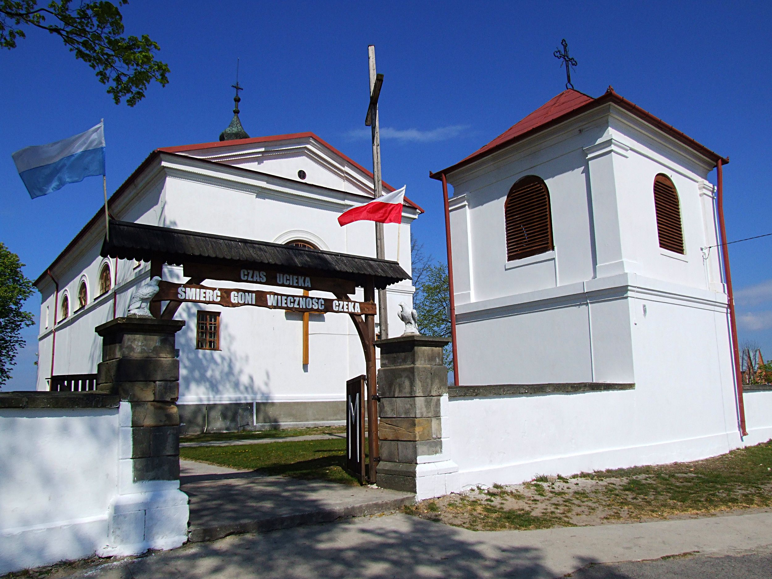 Mirzec - Kościół pw. Świętego Leonarda